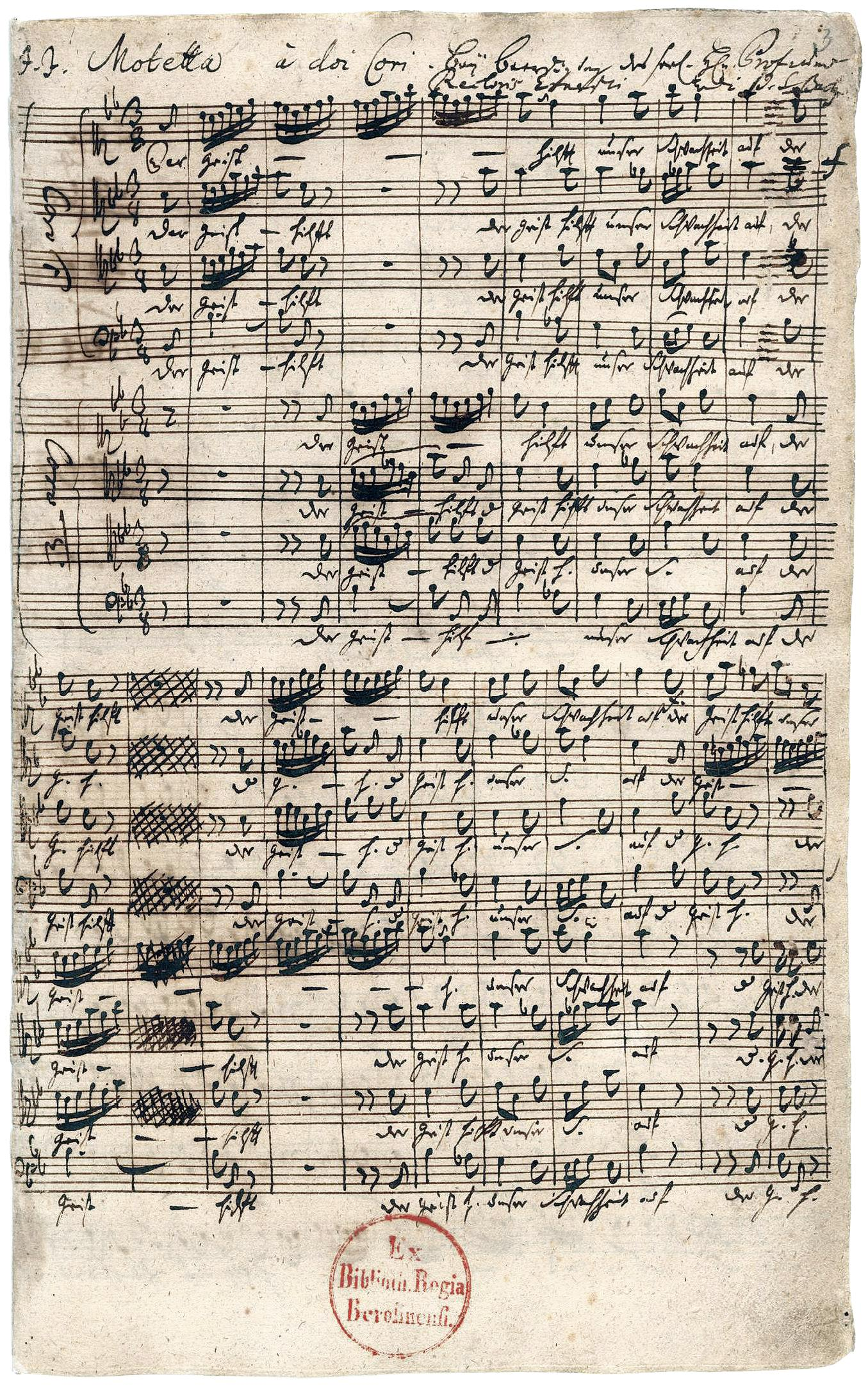 Autograph der Motette Der Geist hilft unser Schwachheit auf (BWV 226), komponiert von Johann Sebastian Bach (1685–1750) zur Gedächtnispredigt der Universität Leipzig für den Professor der Universität und Rektor der Thomasschule Johann Heinrich Ernesti (1652–1729) am 21. Oktober 1729